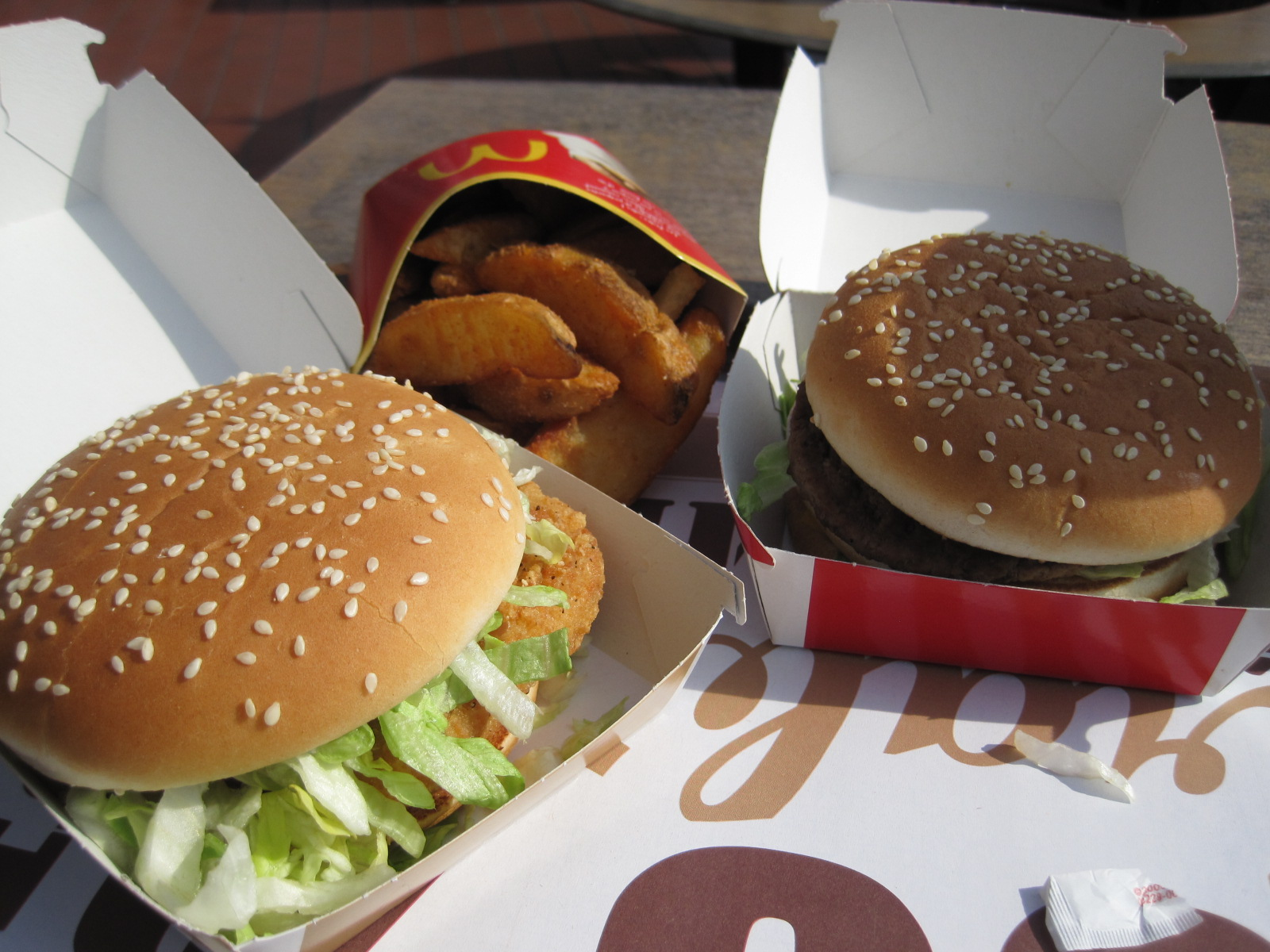 Big Mac + Mac Chicken + potatoes